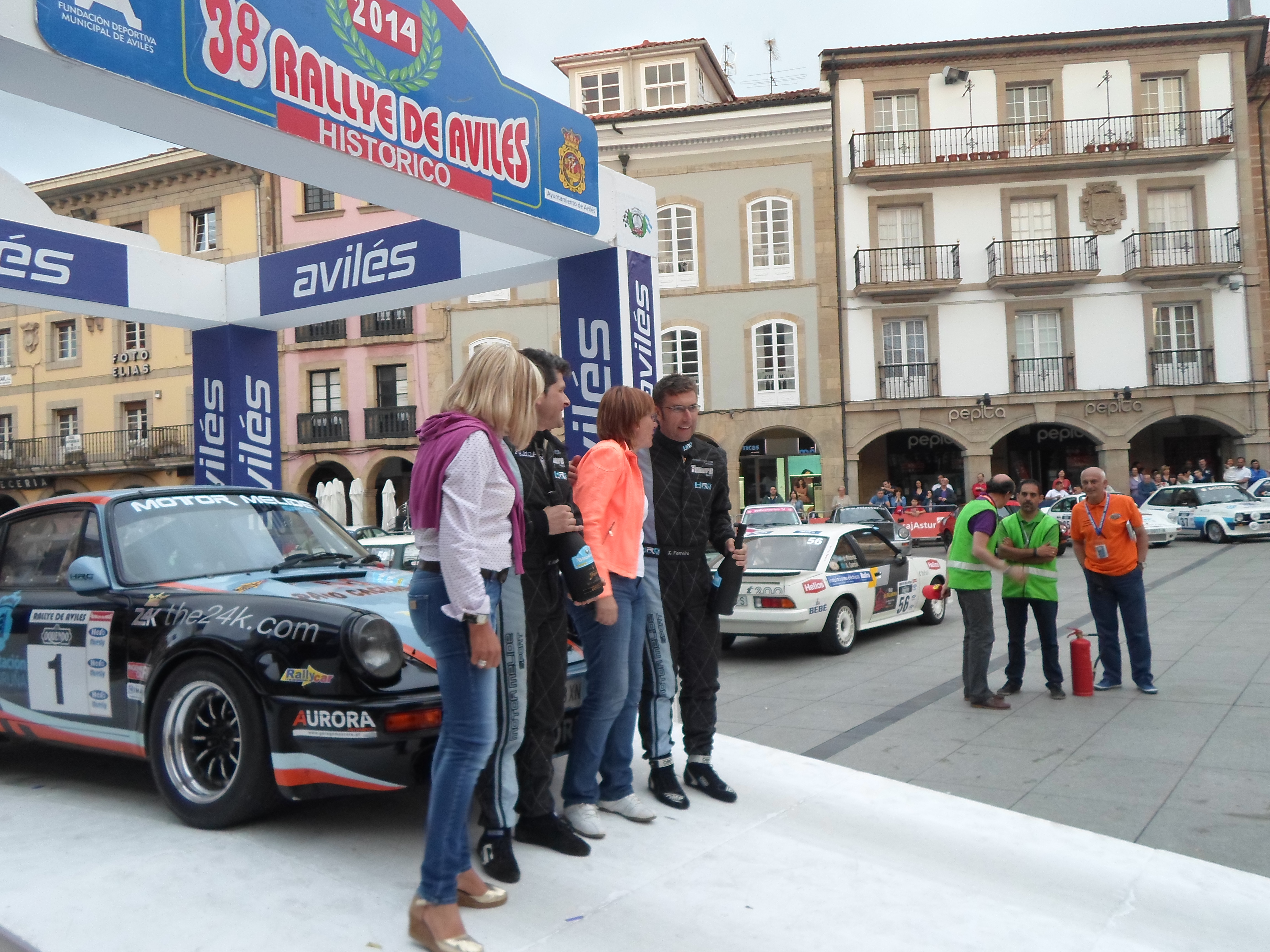 Jesús Ferreiro (Porsche Carrera RS) ganador del rally de aviles 2014